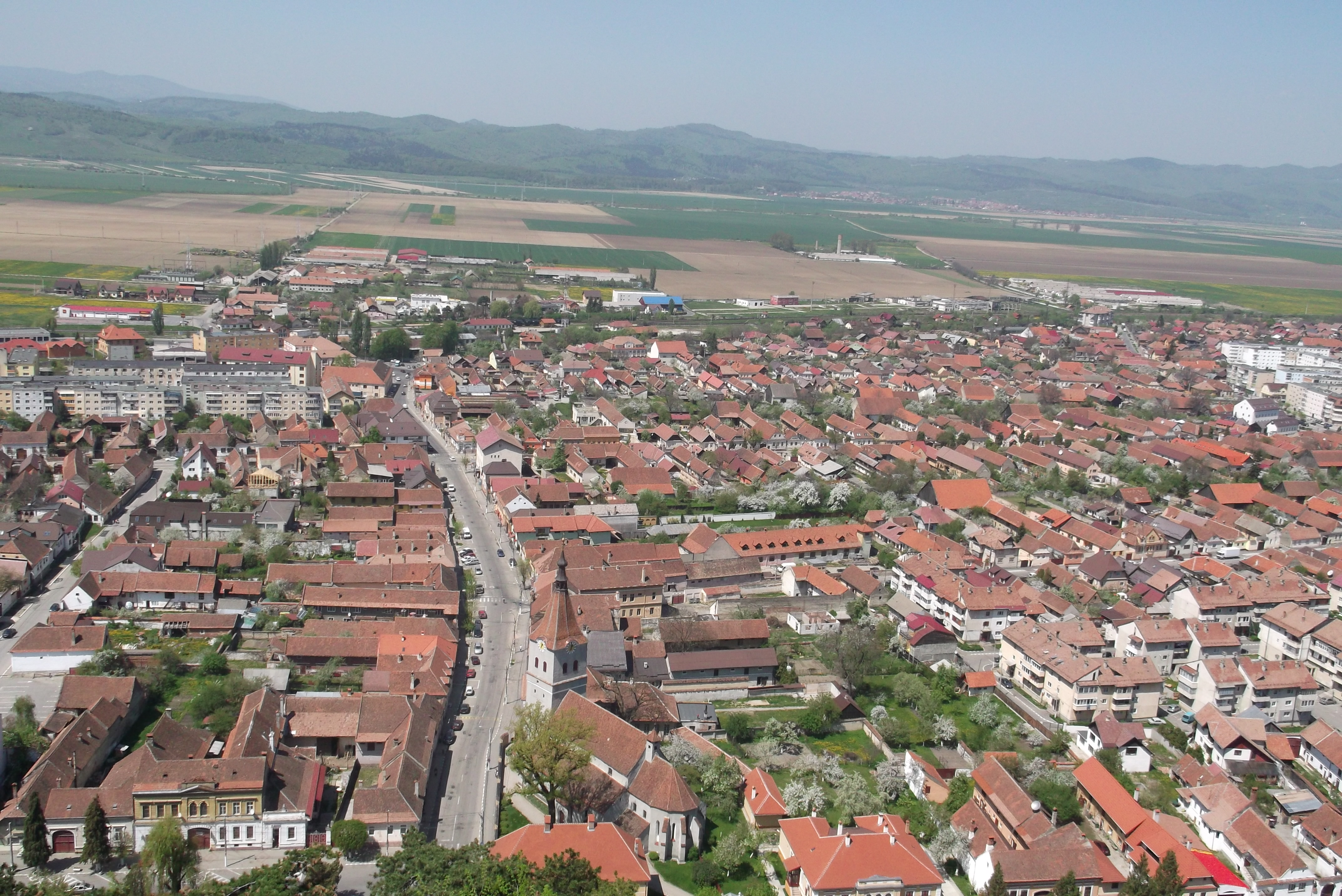 Rumunia, Râșnov - widok z zamku chłopskiego